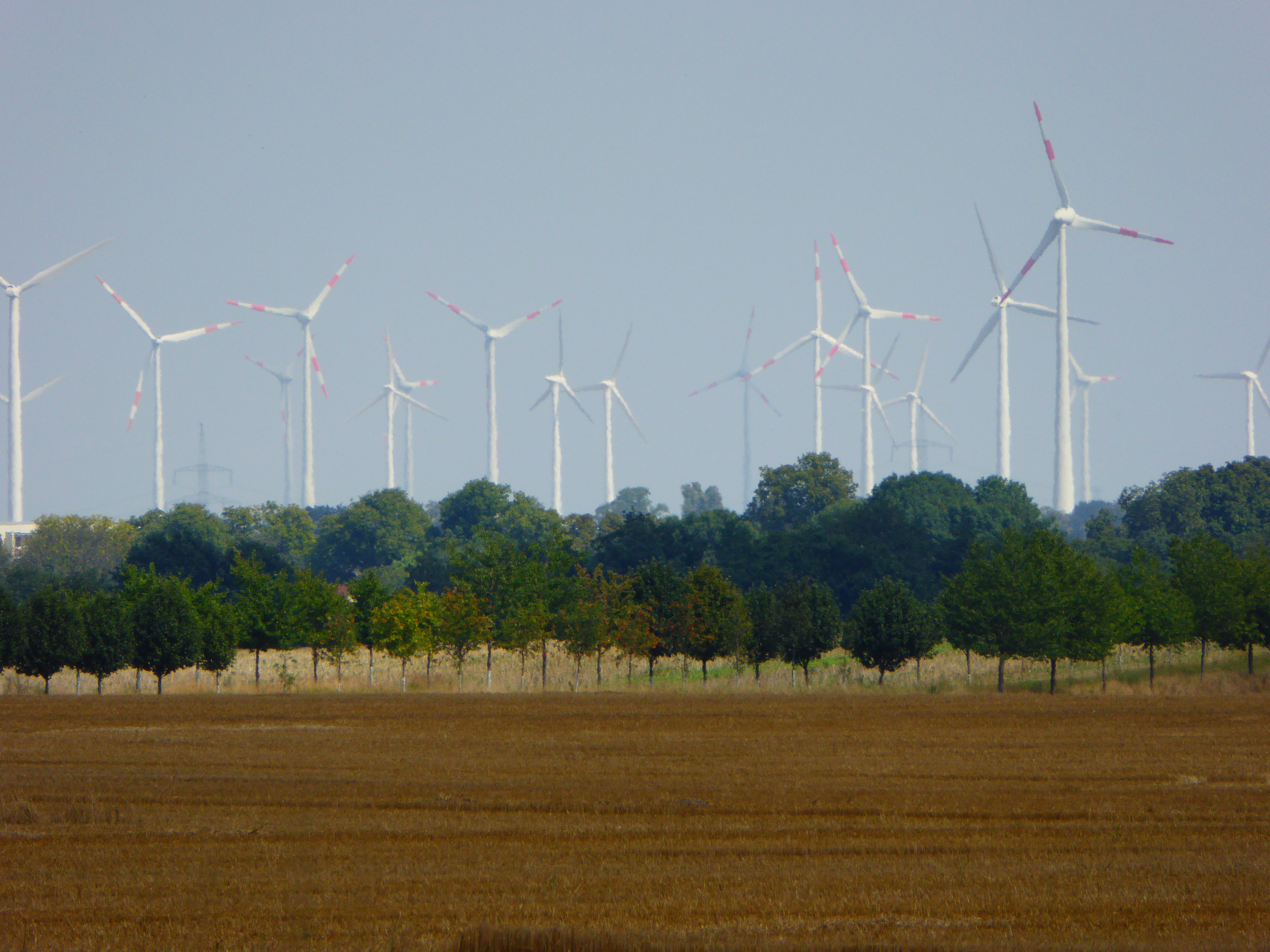 Windkraftanlagen (WKA) bei Groß Behnitz (14641 Nauen)